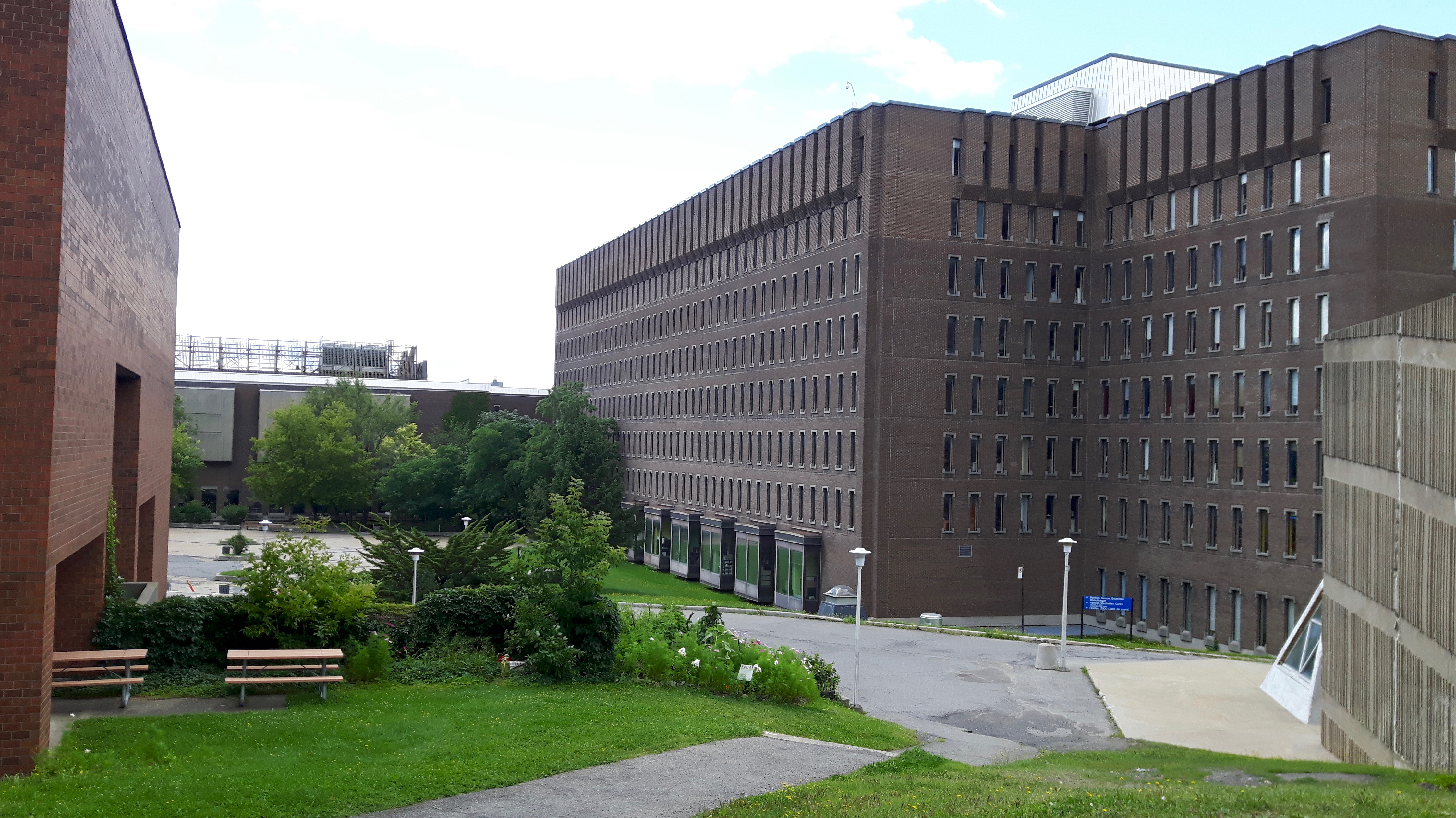 Pavillon Lionel-Groulx, Université de Montréal.